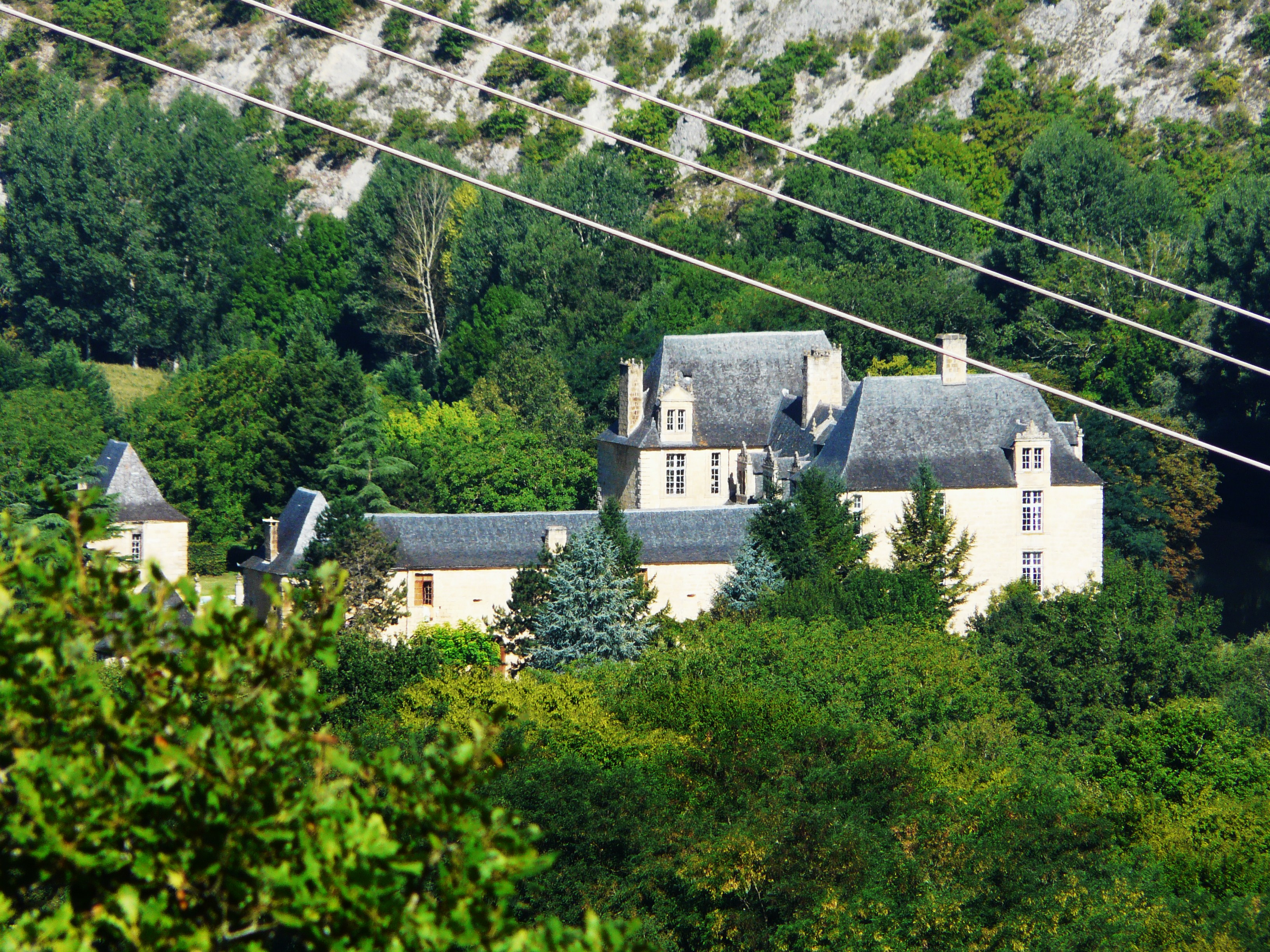 Le château de Sauvebœuf (vu depuis le coteau de l'Escaleyrou), Aubas, Dordogne, France Object location45° 05′ 41.7″ N, 1° 11′ 56.5″ E